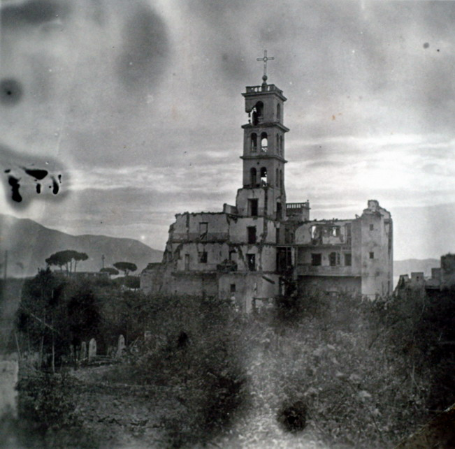 Il Santuario dopo i bombardamenti della seconda guerra mondiale